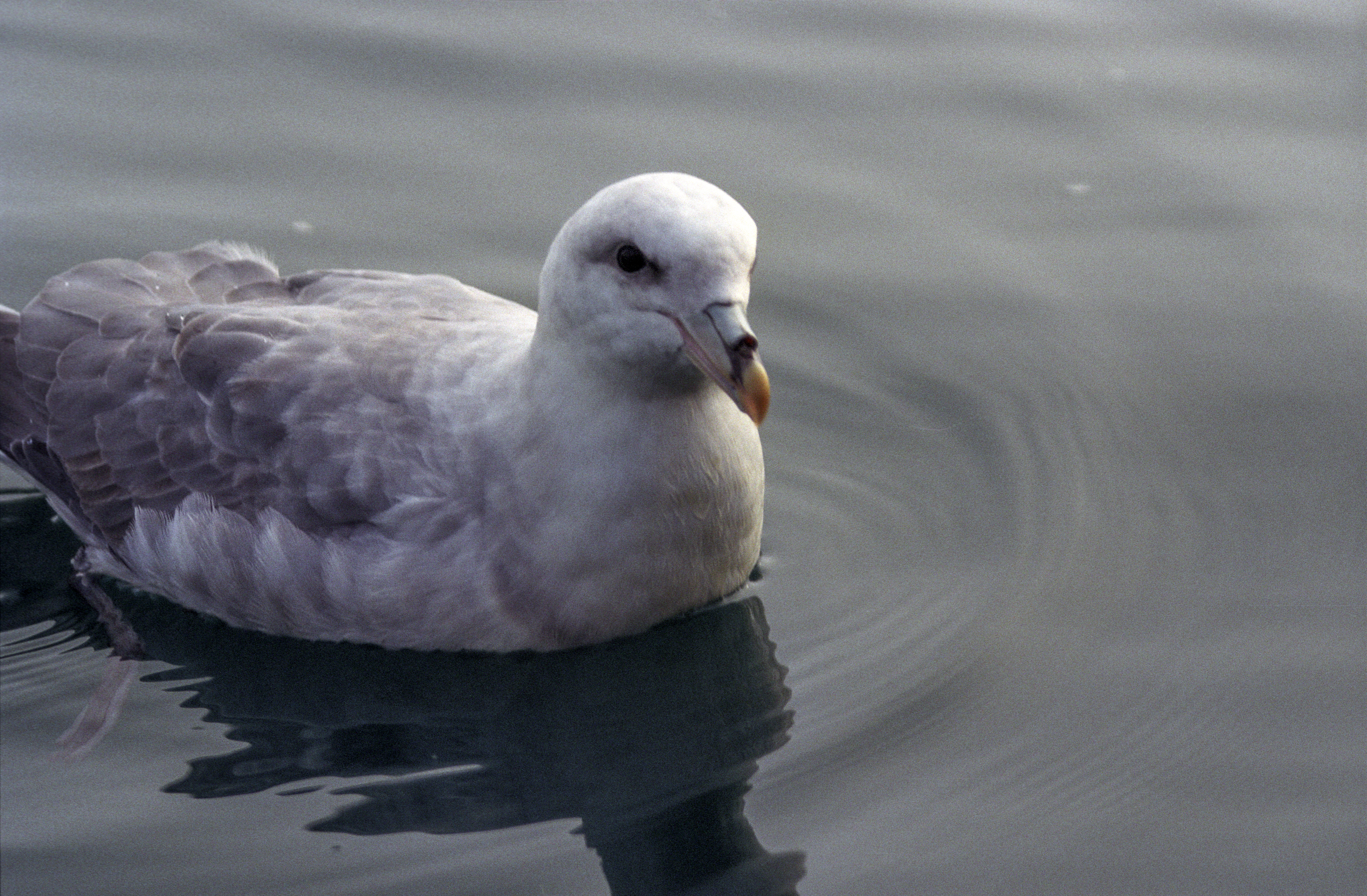 Spitsbergen, Alkefjellet, Fulmar (Fulmarus glacialis)